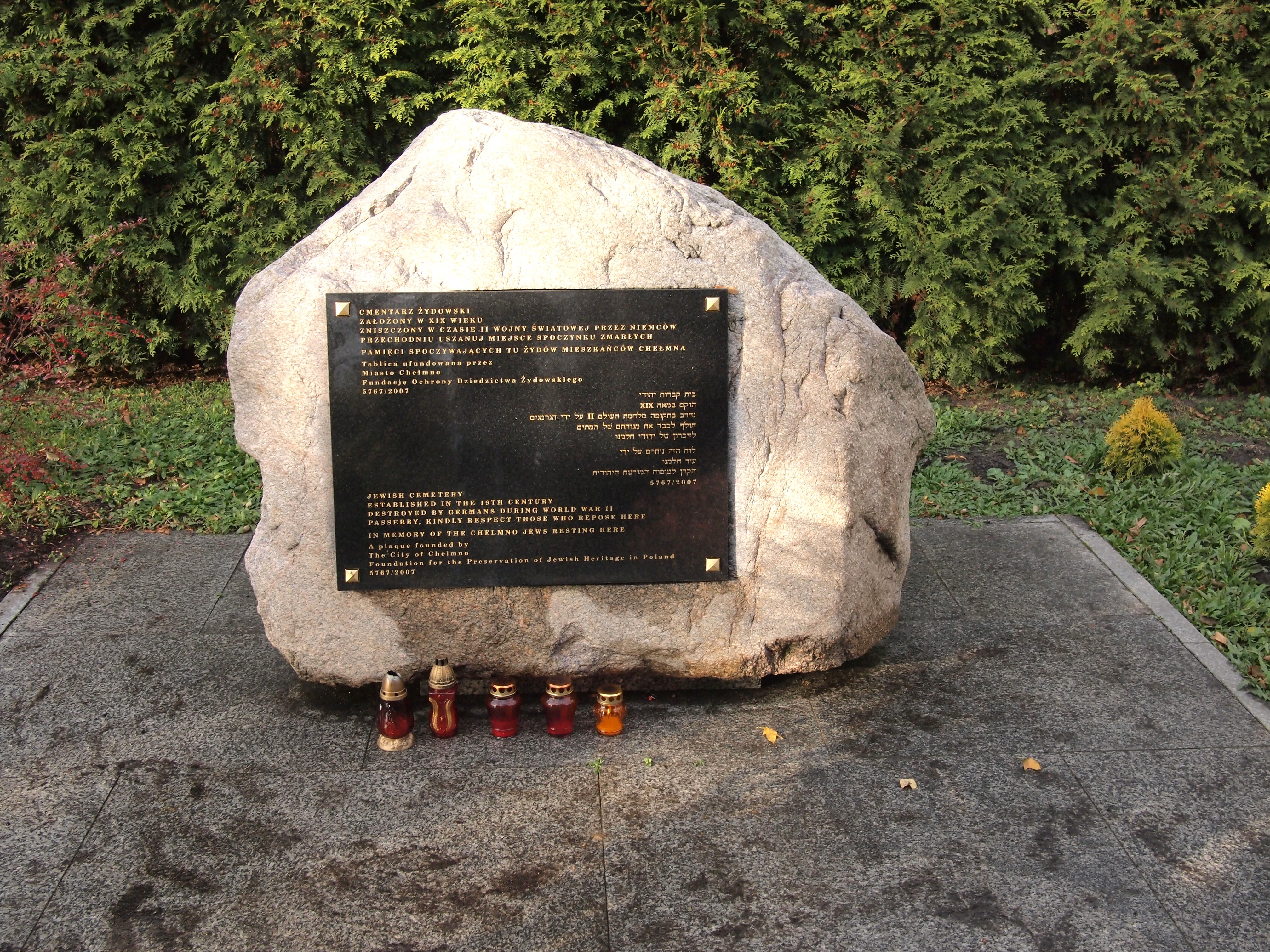 Chełmno.